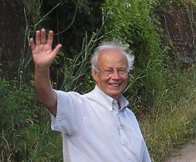 Un saluto lungo una via di campagna, nel Cilento